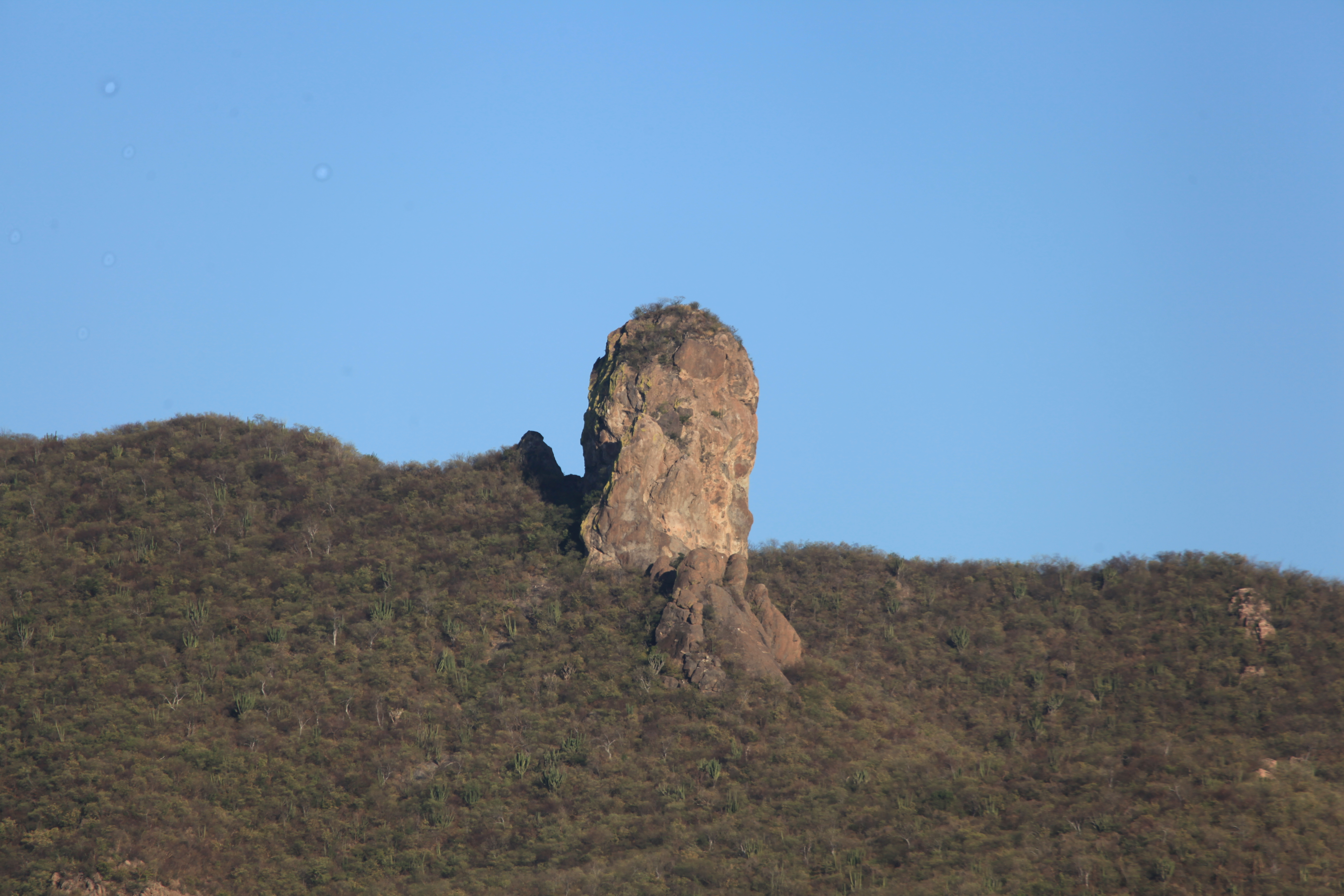 Cerro en San Blas